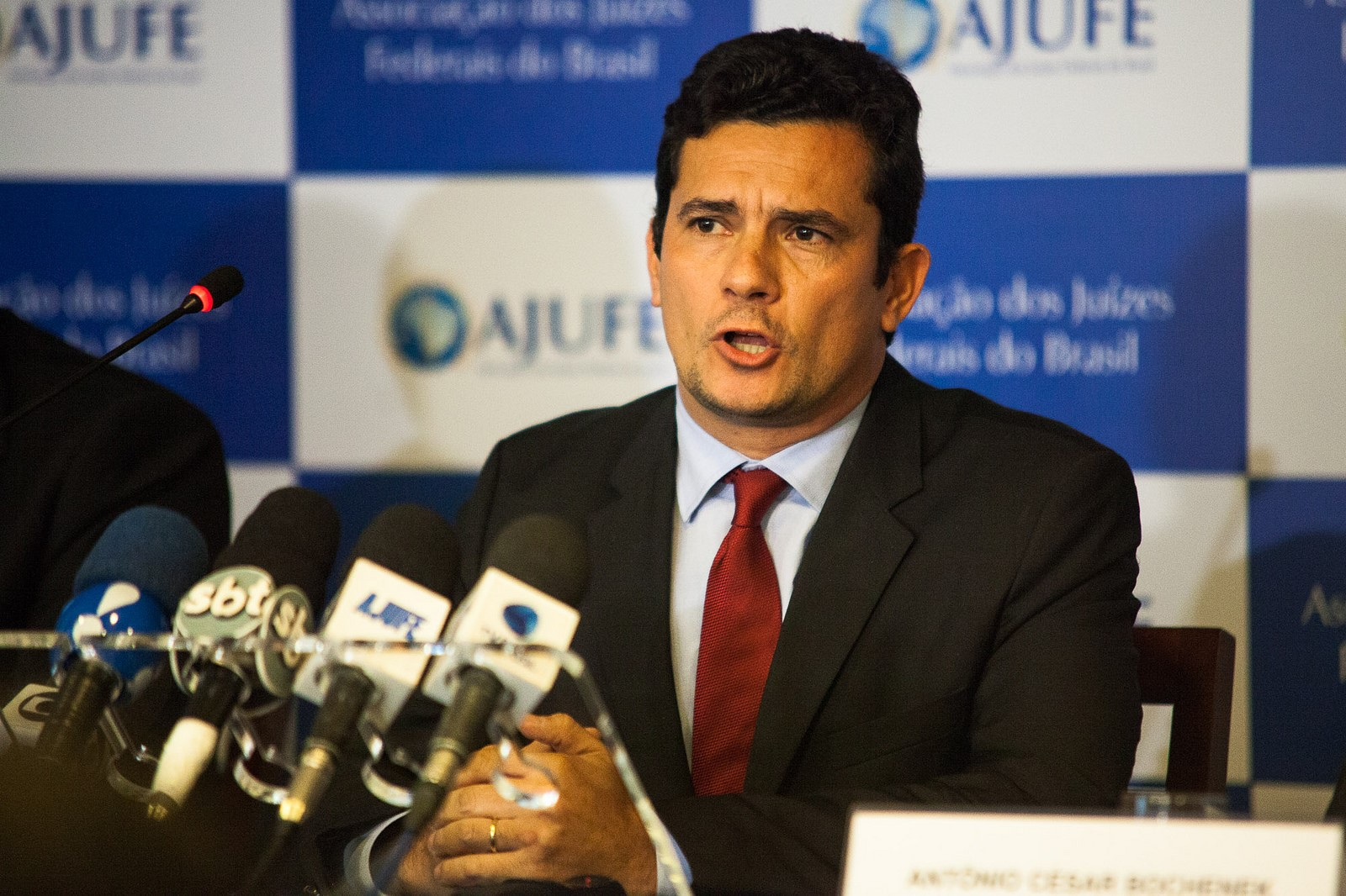 Sérgio Moro na AJUFE